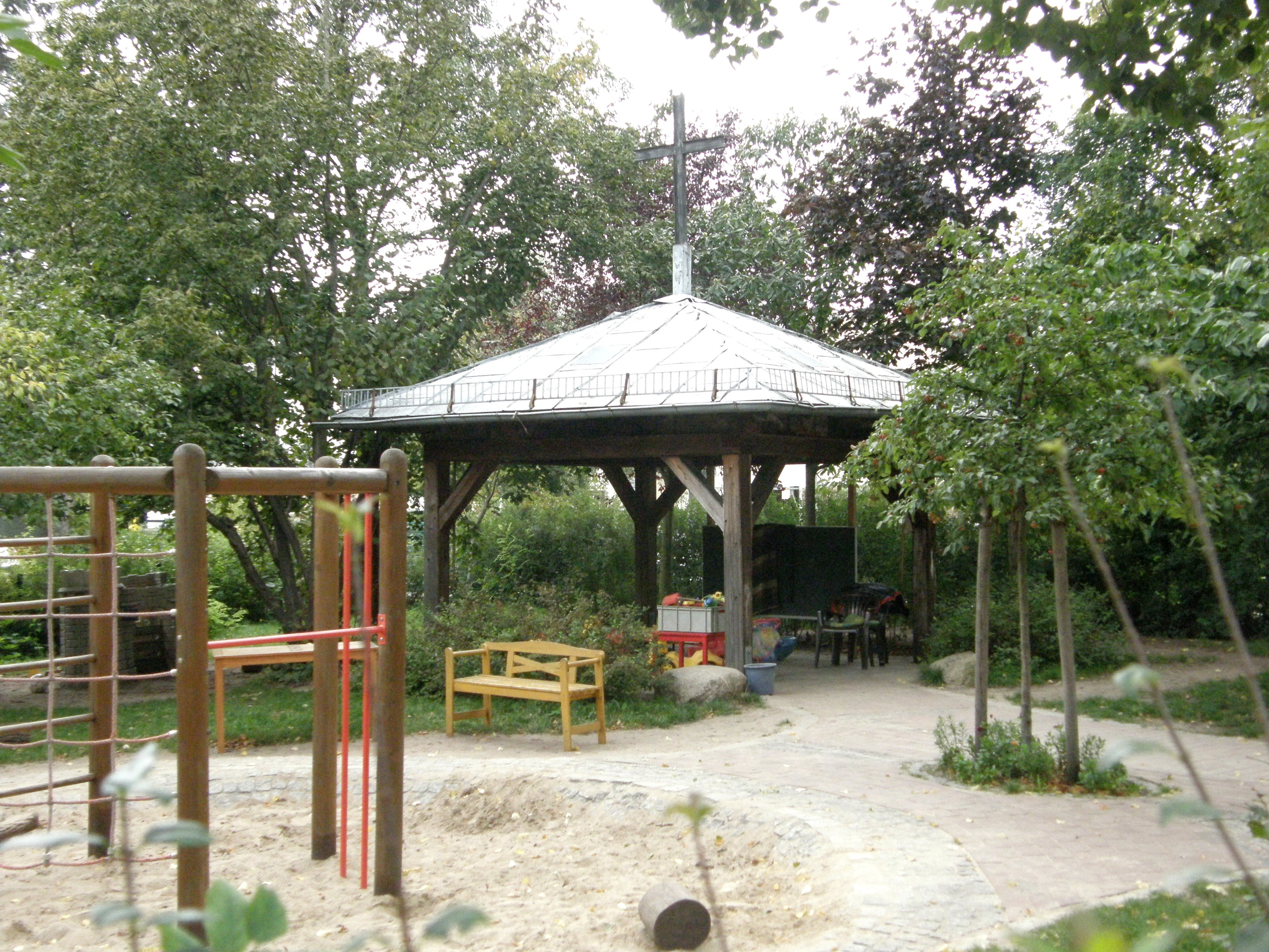 Berlin-Kaulsdorf, ev. KiTa der Dorfkirche: Kirchendach von 1945/1979 als Baldachin